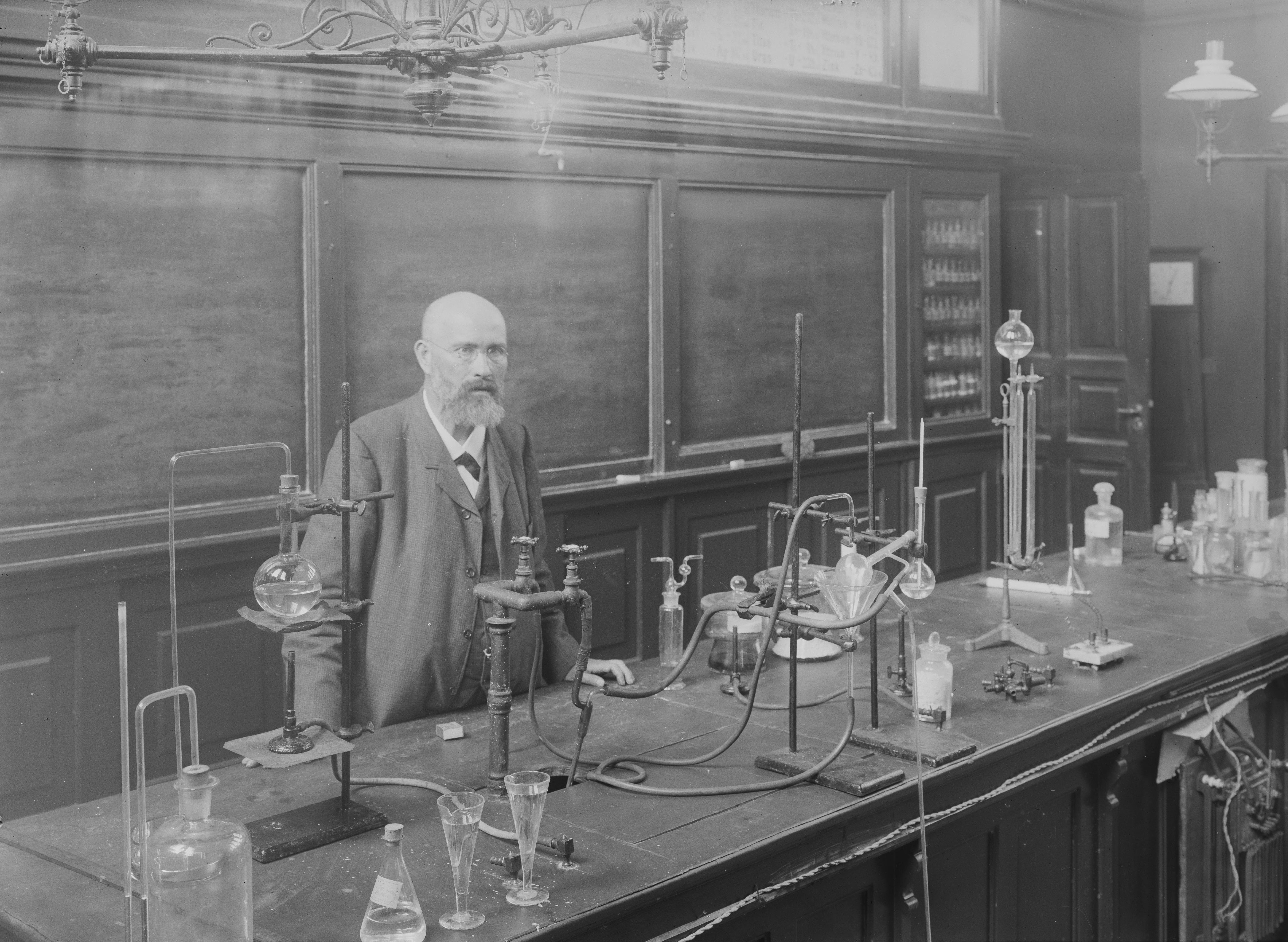 Bildet er hentet fra Nasjonalbibliotekets bildesamling. Anmerkninger til bildet var: Påskrift arkivark: Professor Goldsmit Arkivnummer: 206 Oslo, Oslo